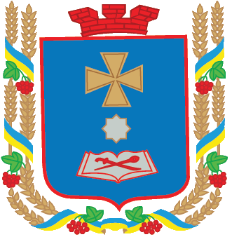 Герб Миргородського району